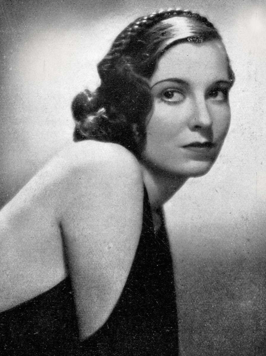 L'attrice Valerie Hobson in un'immagine pubblicata in Italia nel 1935